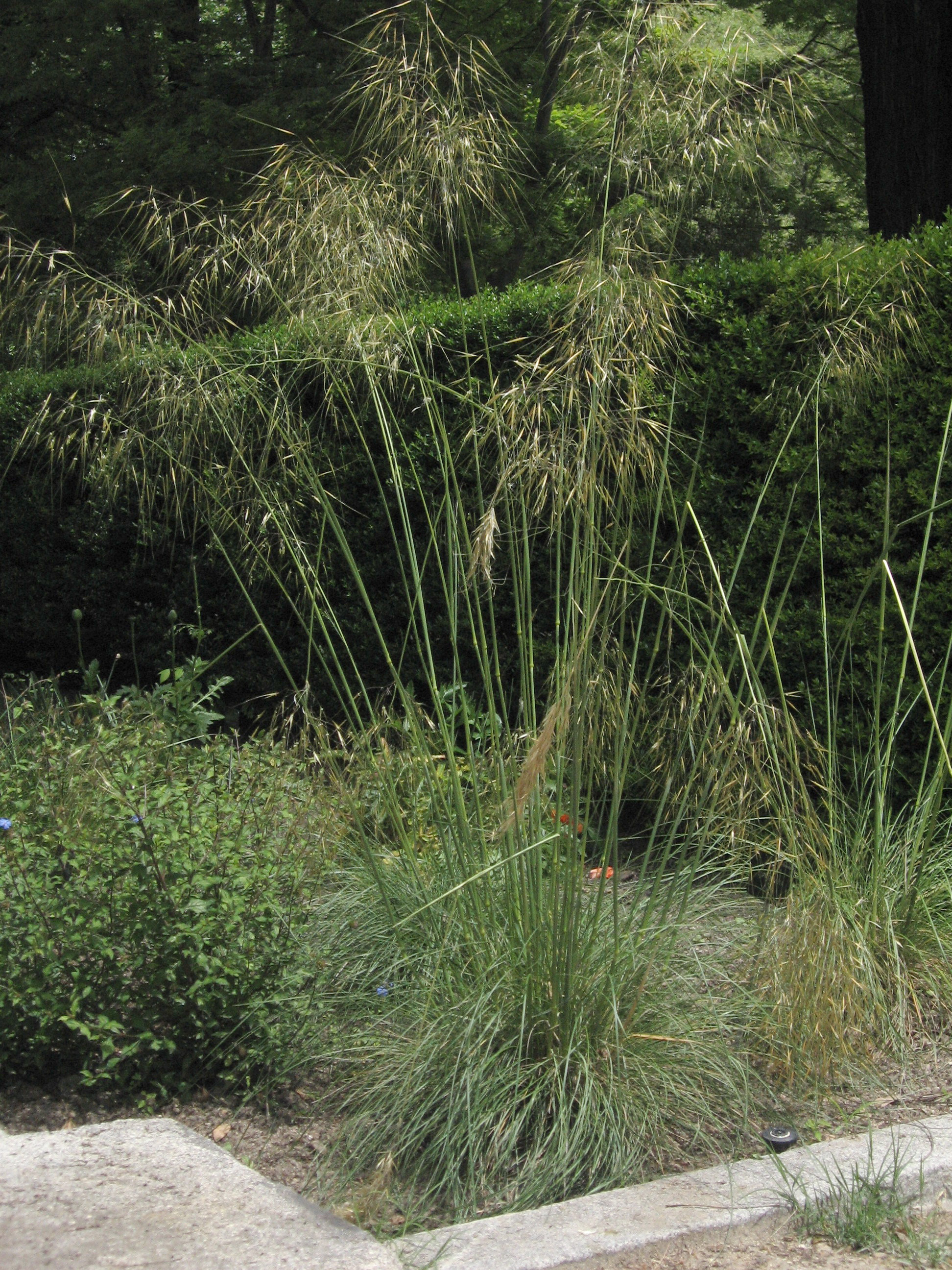 Stipa gigantea. Real Jardín Botánico de Madrid.